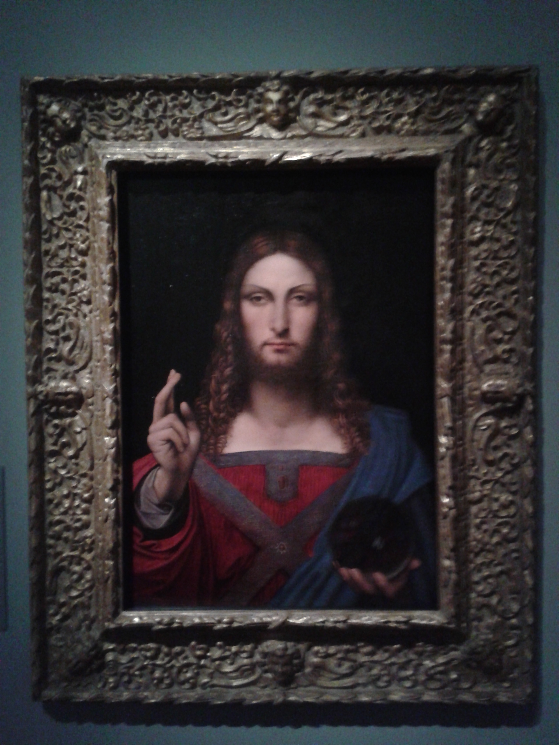 Salvator Mundi - Version Ganay - Atelier de Leonard de Vinci. Lors de sa présentation au Louvre expo L. de Vinci 2019 - 20. Paris. Collection Privée